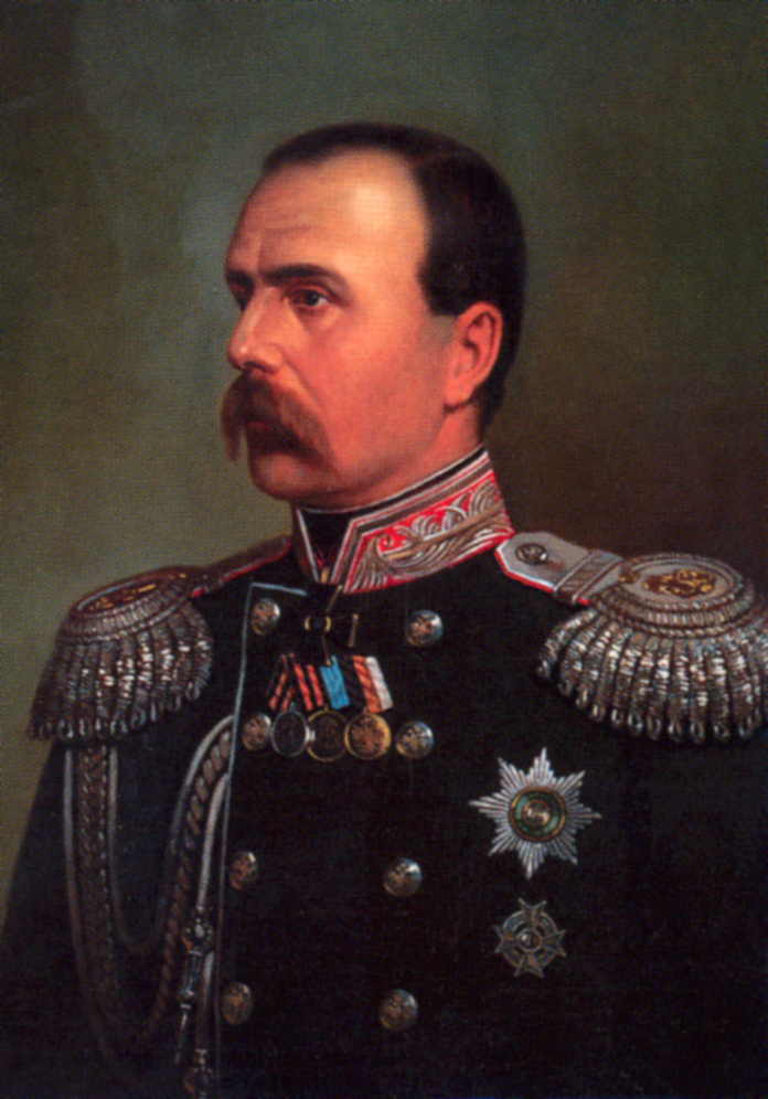 Граф Влади́мир Алексе́евич Бо́бринский (2 (14) октября 1824—22 мая (3 июня) 1898) — крупный сахарозаводчик из рода Бобринских, генерал-майор и действительный тайный советник. В 1869-71 гг. министр путей сообщения Российской империи.